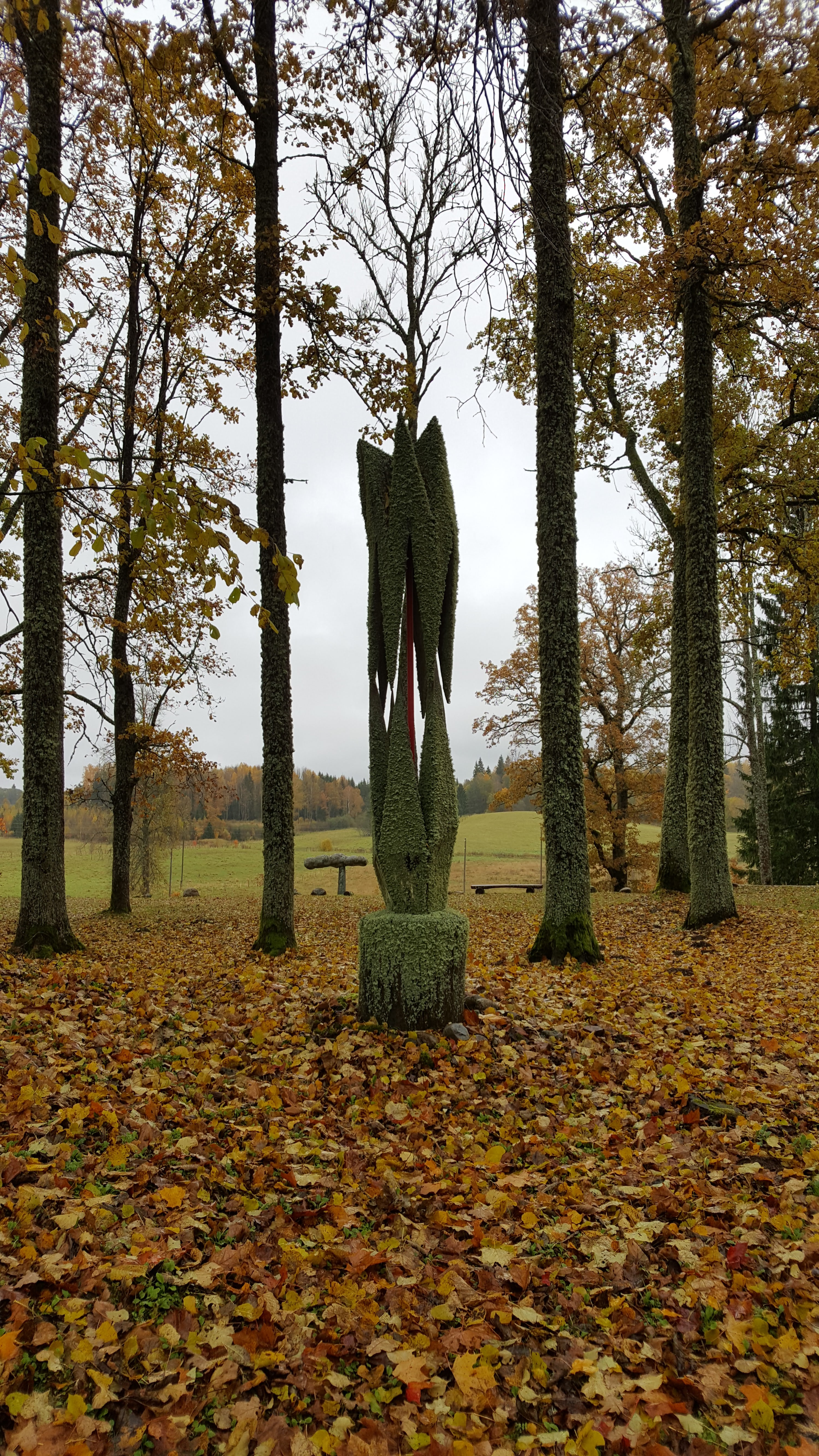 Kaive mõisa pargiskulptuur 2017. aastal